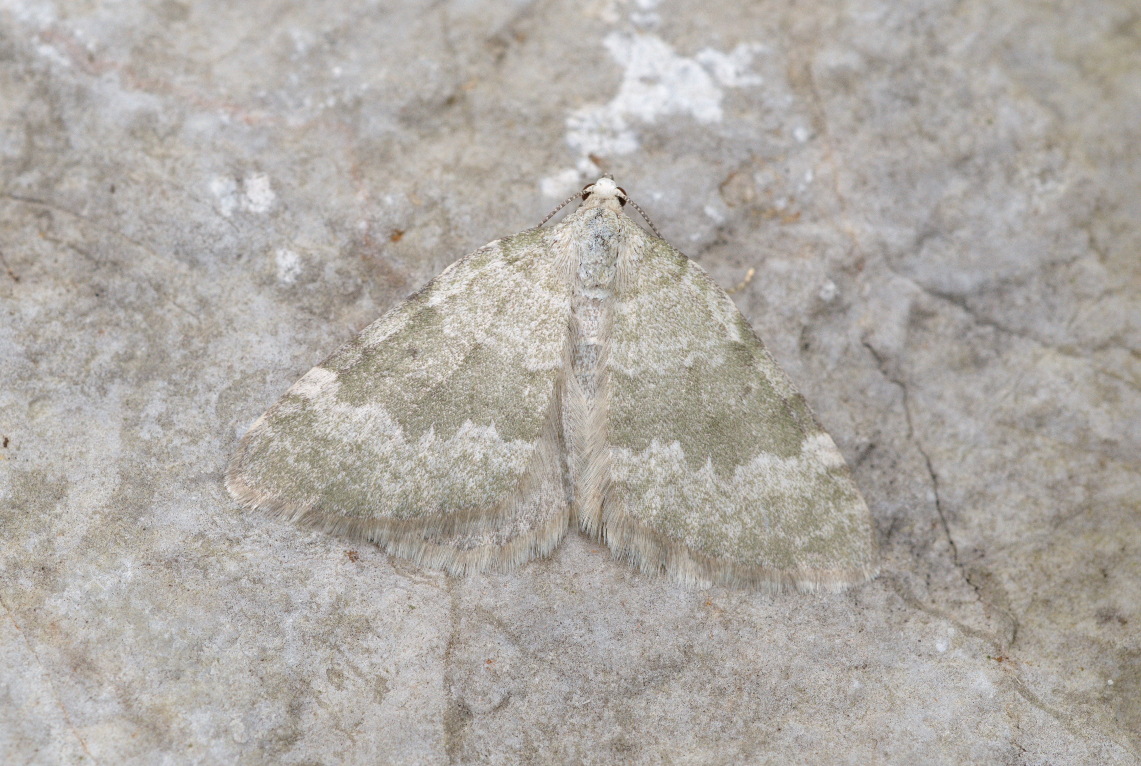 Colostygia aqueata Location: Großer Buchstein @ approx. 850 m, Gesäuse National Park, Styria, Austria 8 Makro f/11 Film / Speed: ISO 400 Comment: identification: Heinz Habeler